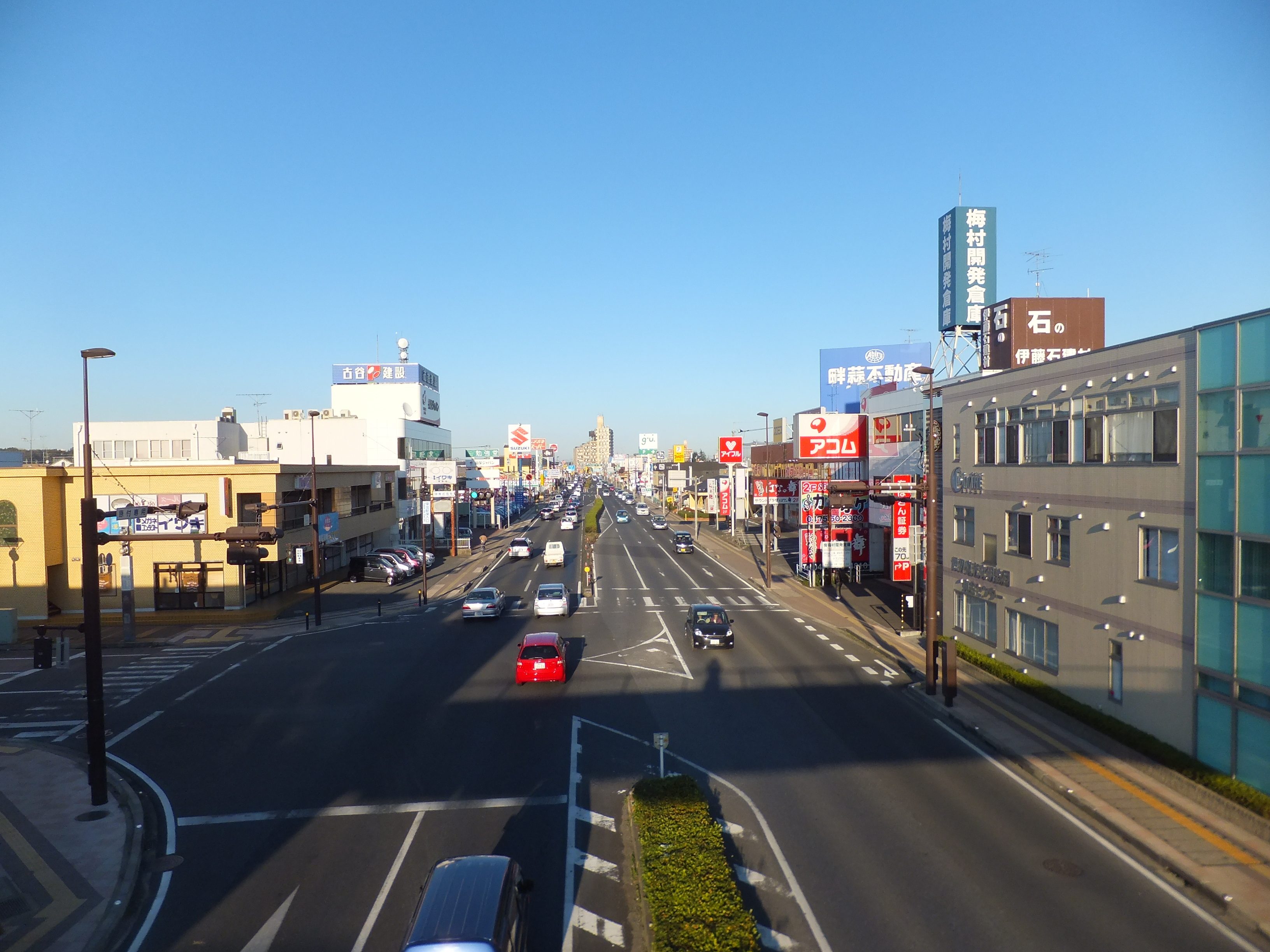 国道126号、東金駅東入口交差点付近